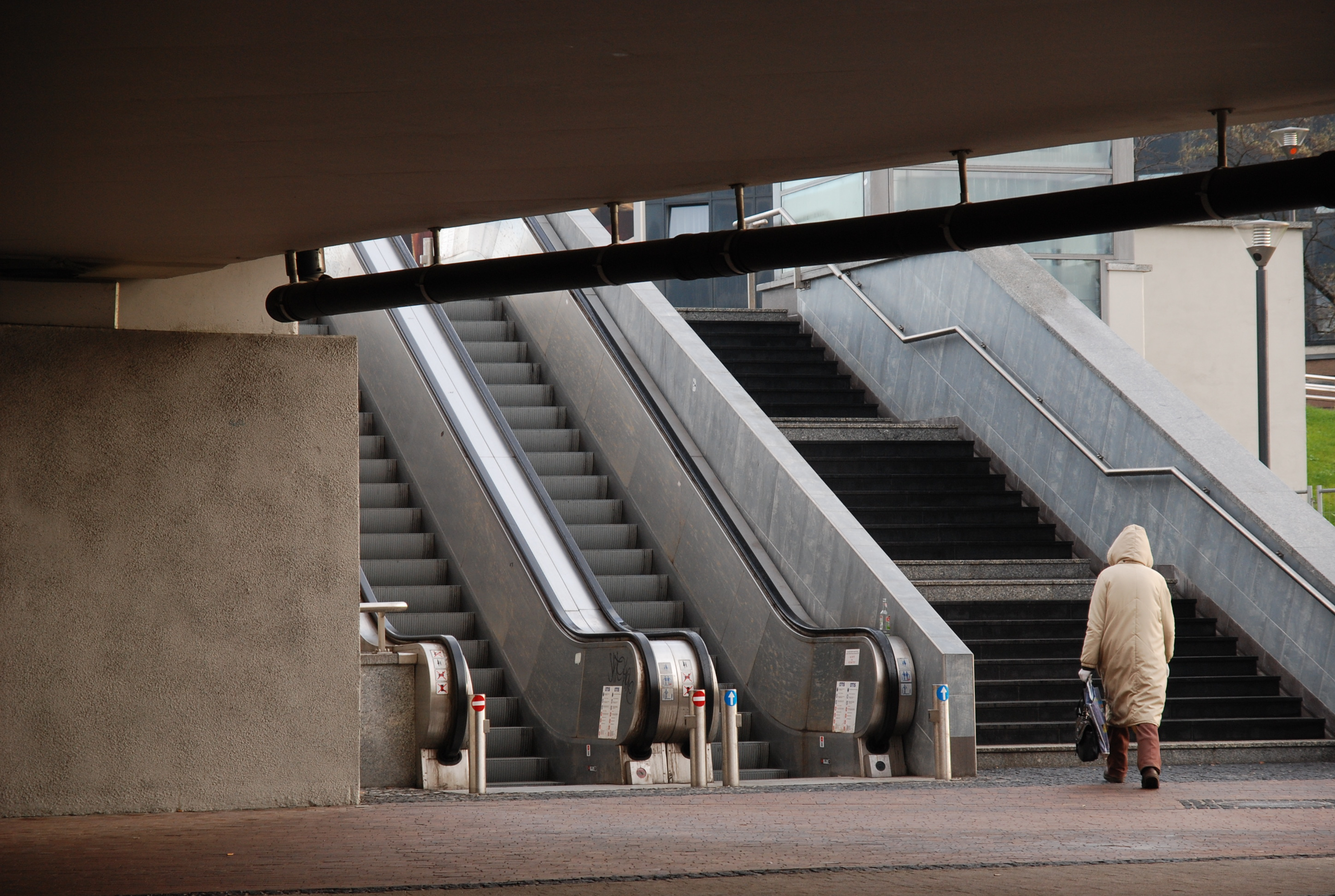 Dolny poziom Ronda Mogilskiego. Kraków